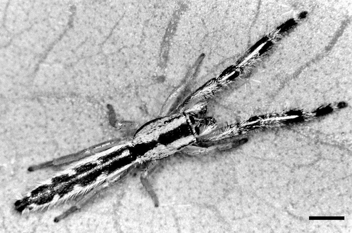 Male Marpissa pikei jumping spider from Cedar Key, Florida, USA